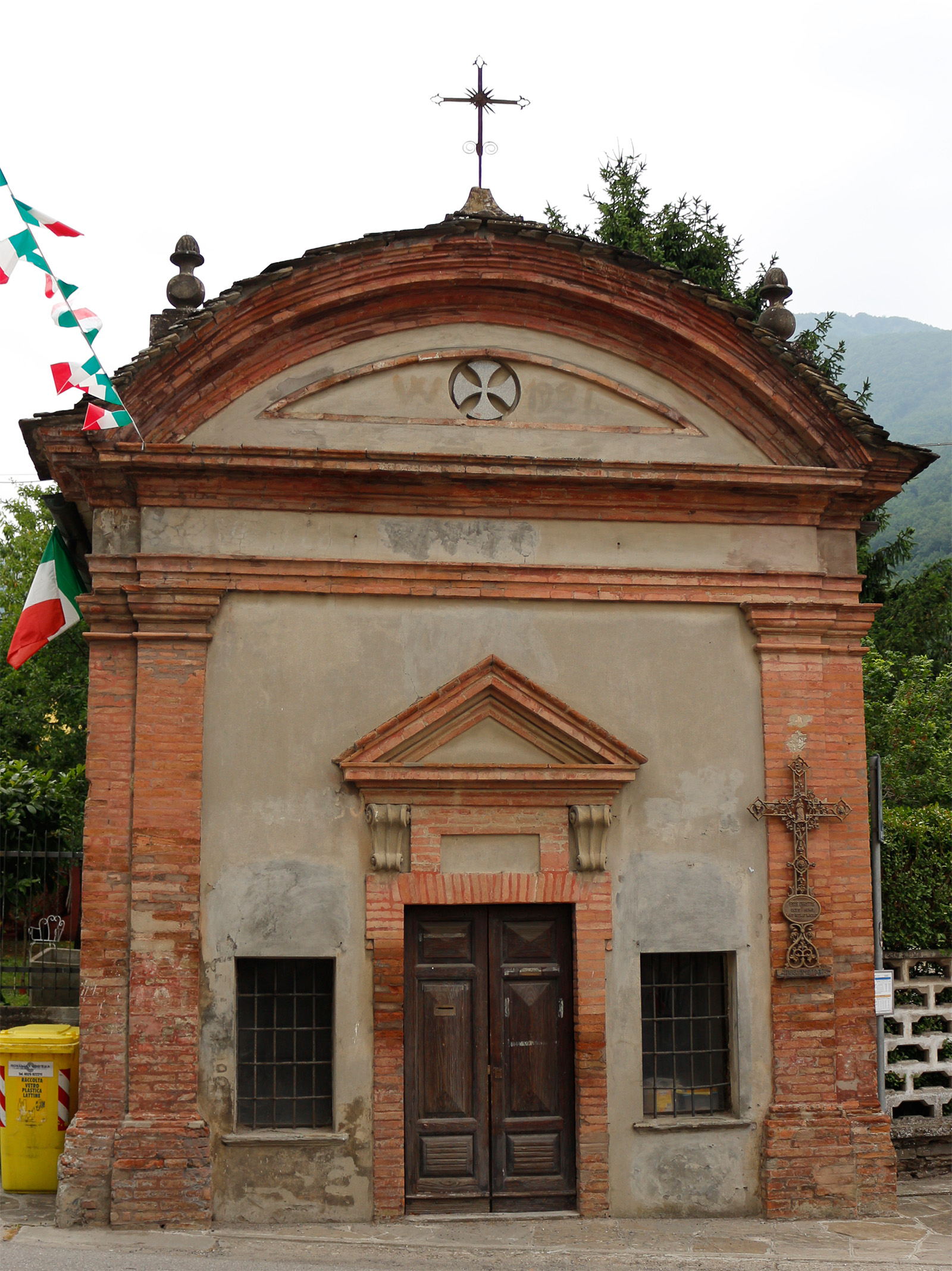 Fronte dell'oratorio della Madonna della Canala